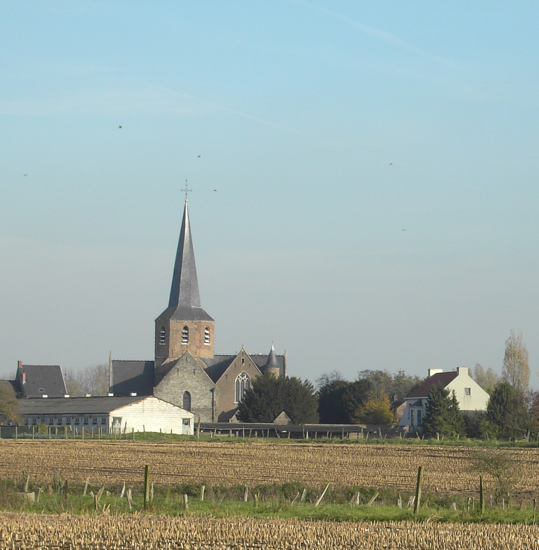 Baaigem - Gavere - Church